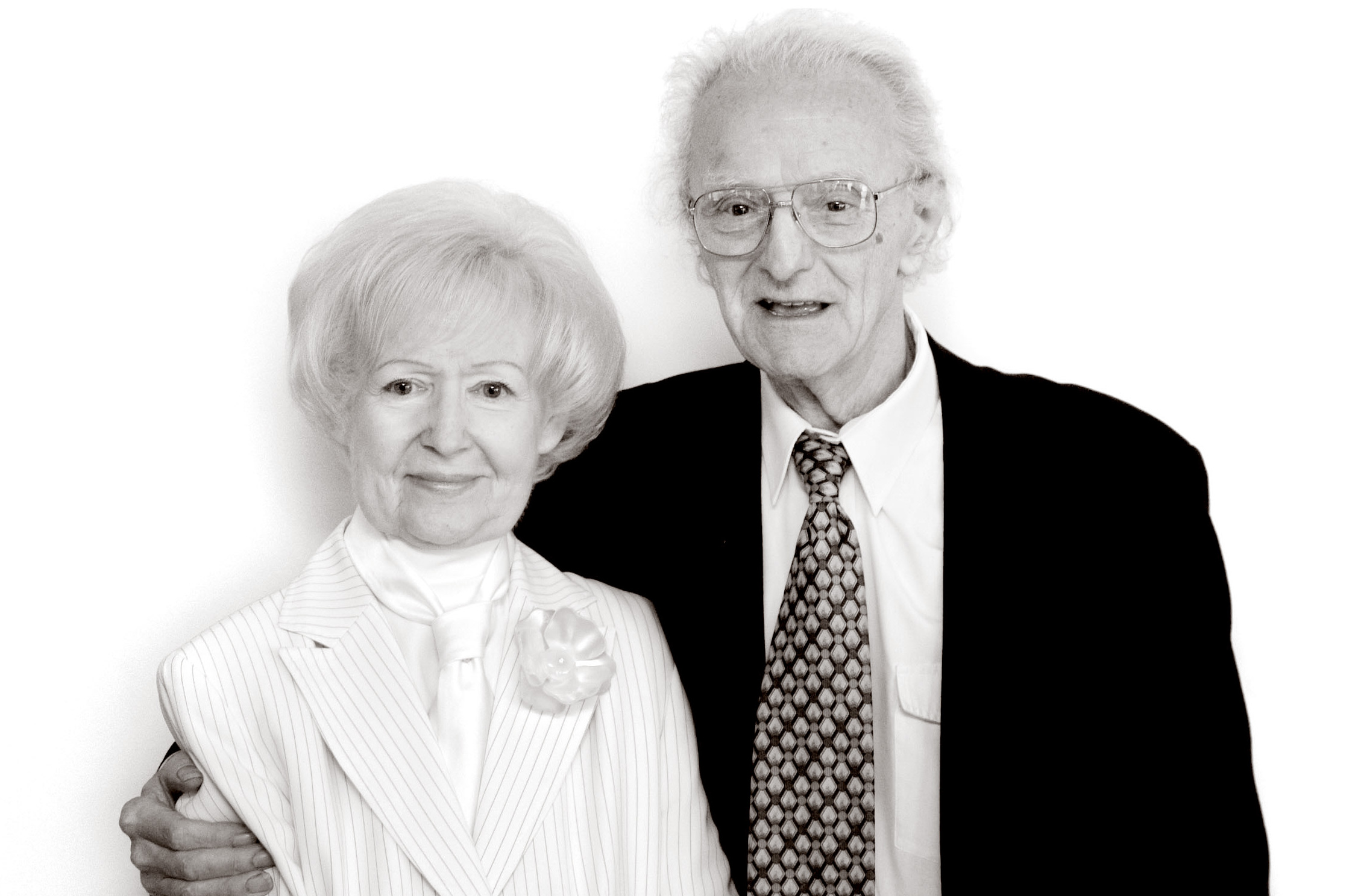 Vlaamse Televisiefiguren - Nonkel Bob (Davidse) en Tante Ria (Mimi Peetermans) - augustus 2003